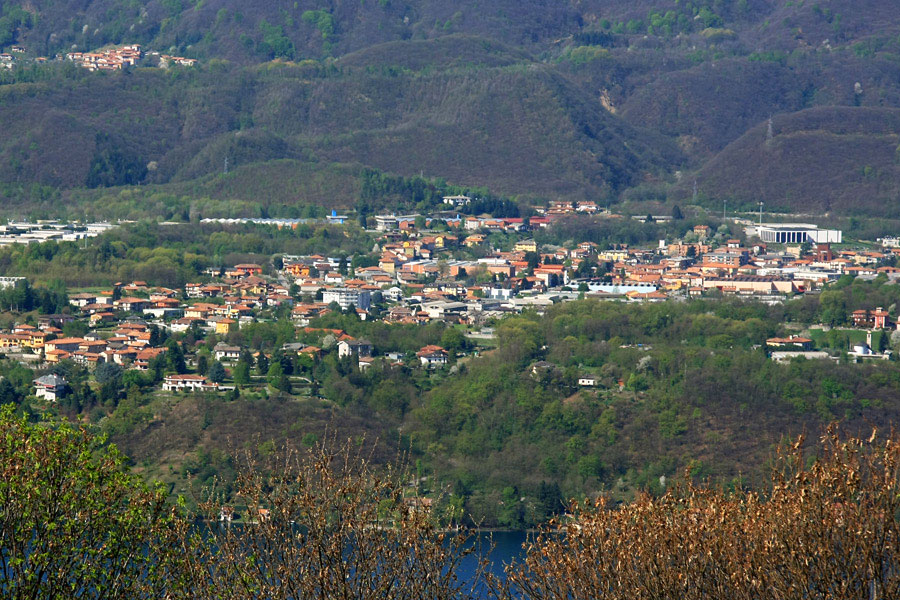 Panorama di San Maurizio d’Opaglio (NO) dal Monte Mesma